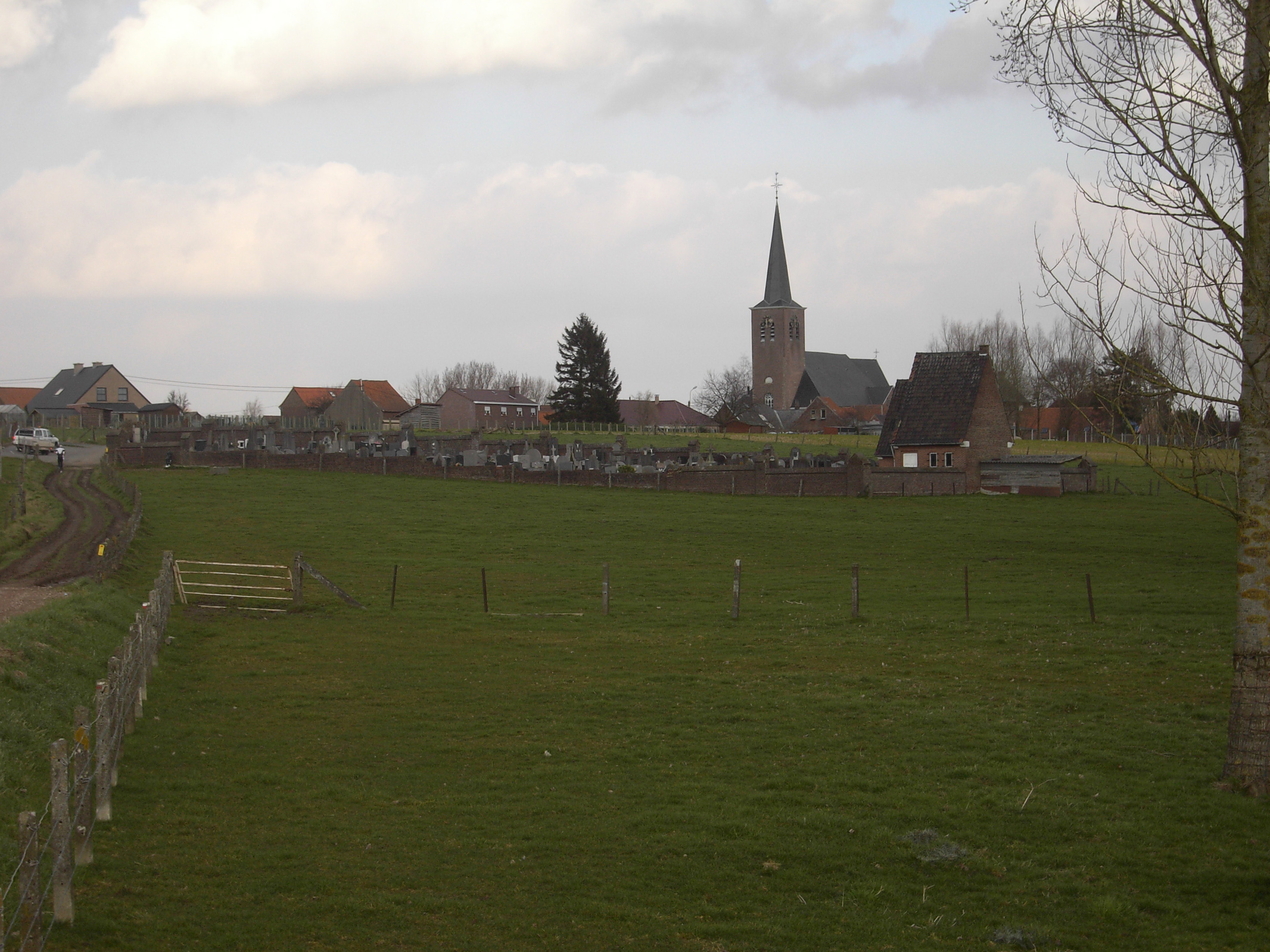 Zarlardinge - Geraardsbergen - Belgium - Church